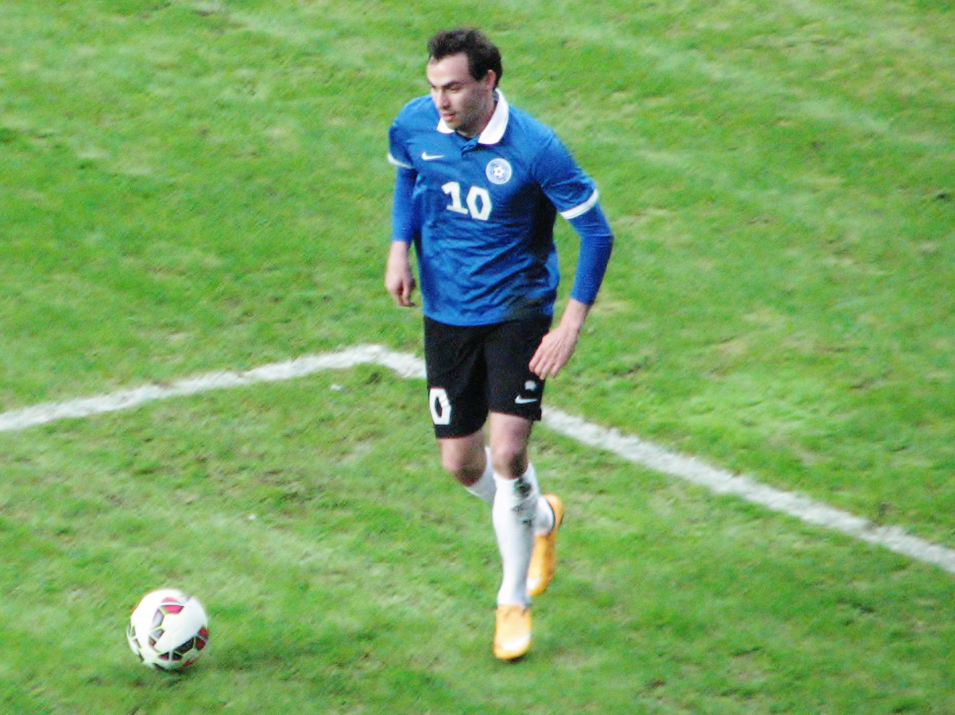 Sergei Zenjov mängimas Islandi koondise vastu Raio Piiroja lahkumismängus